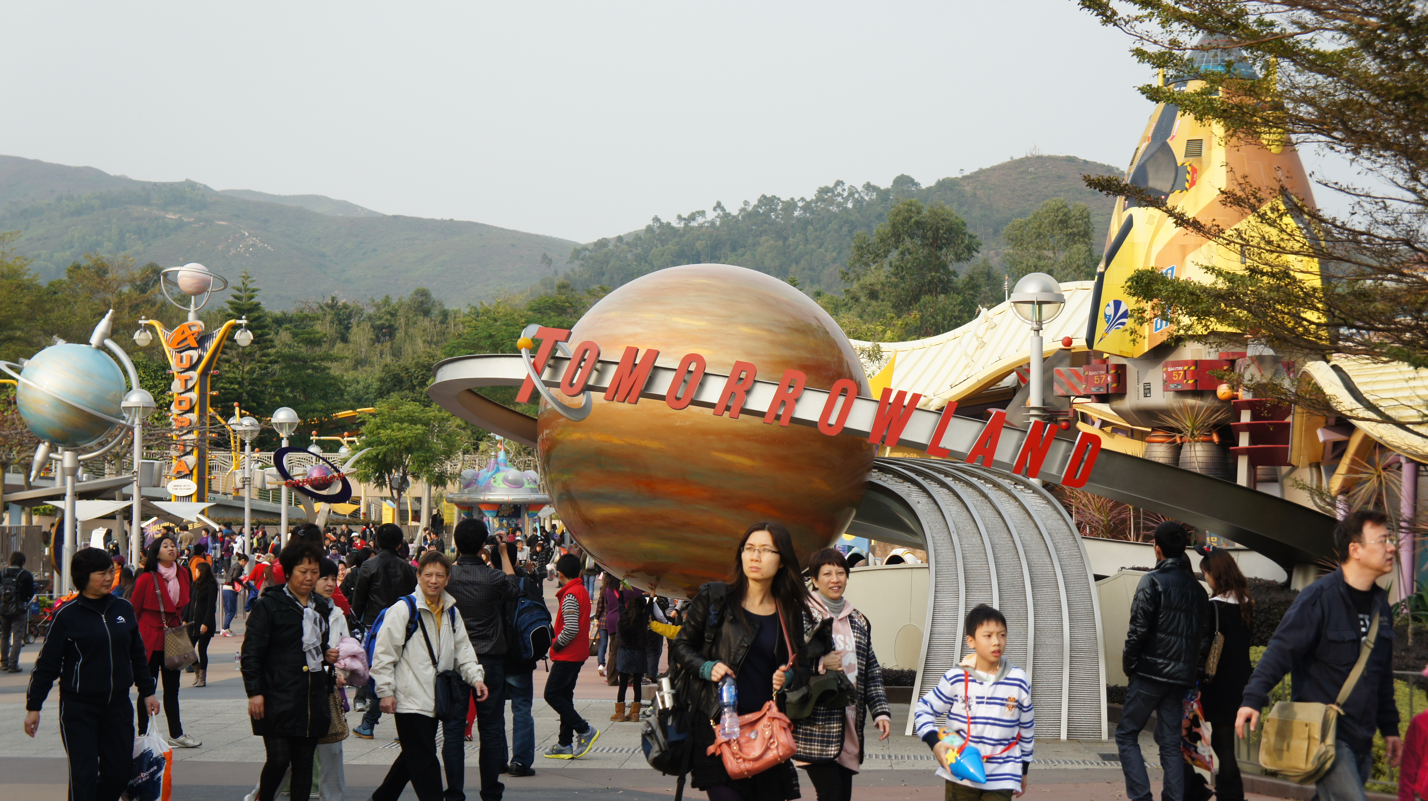 中文（香港）: 明日世界正門（HK）